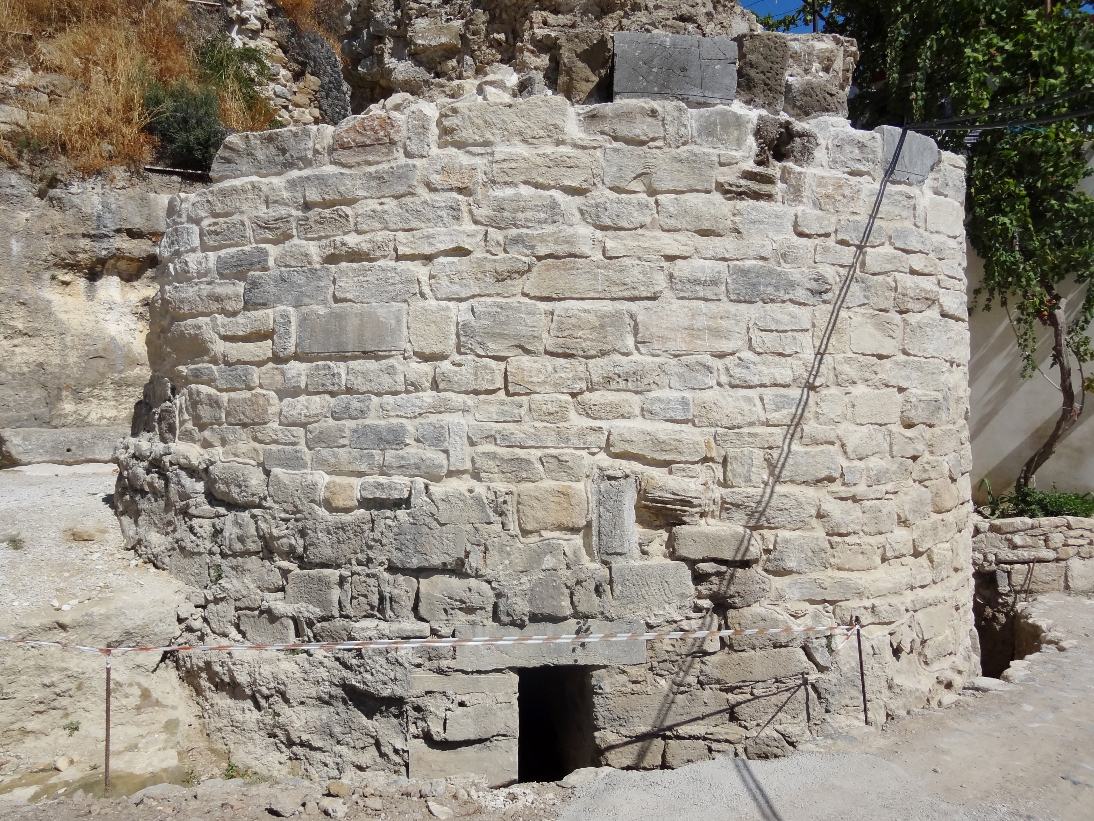 Wehrturm des antiken Polyrrhenia (Πολυρρηνία), Gemeinde Kissamos, Regionalbezirk Chania, Kreta, Griechenland